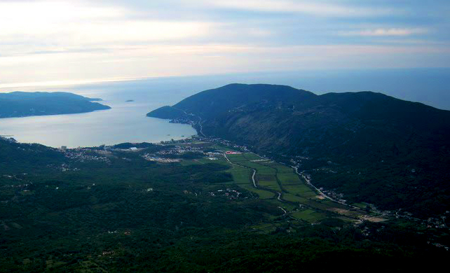 Sutorina, pogled iz Kruševica